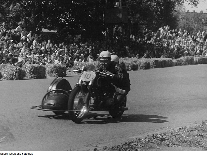 Original image description from the Deutsche FotothekMotorradfahrer beim Stadtparkrennen "Rund um das Scheibenholz"